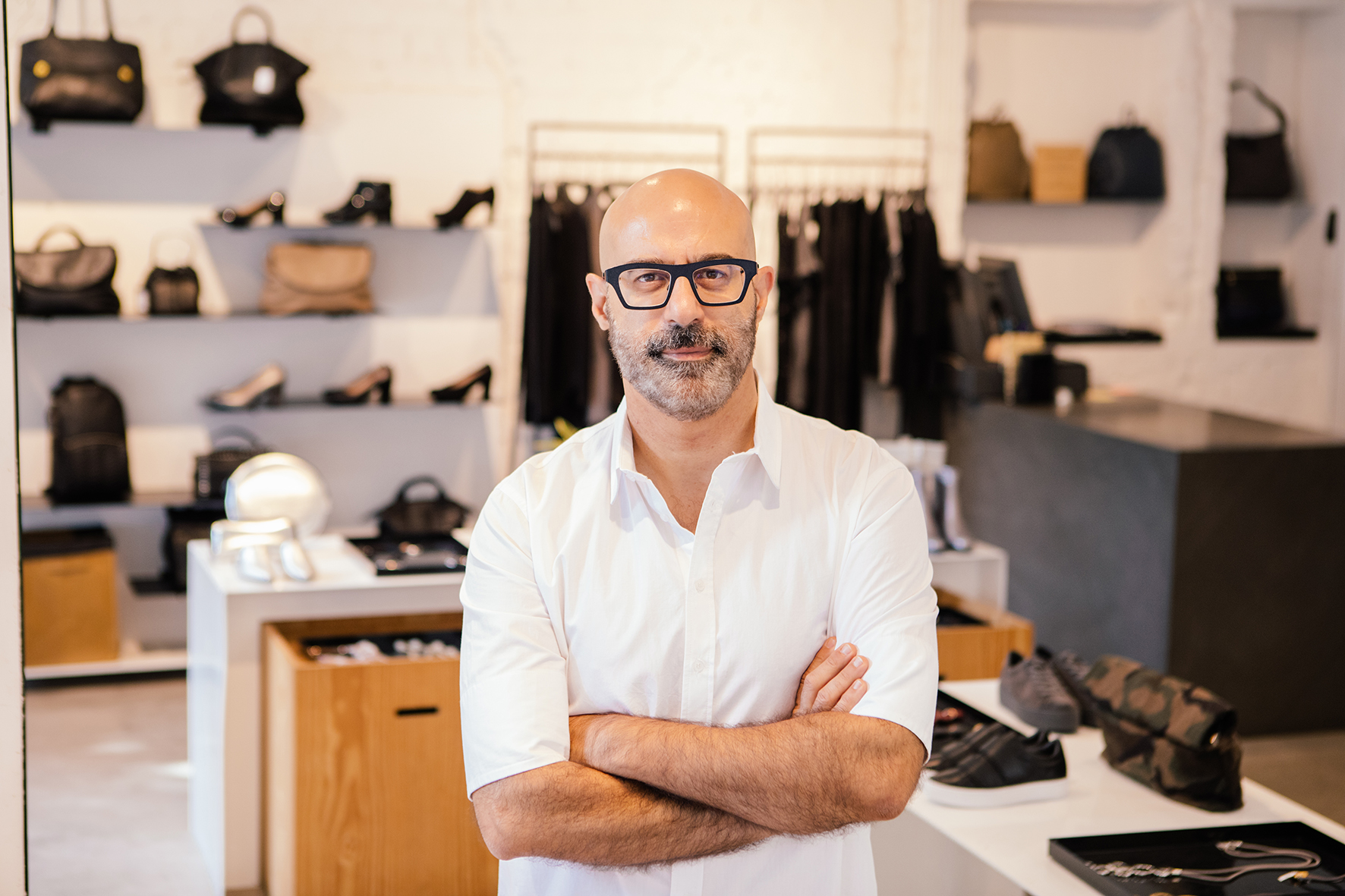 תמונה של רונן חן